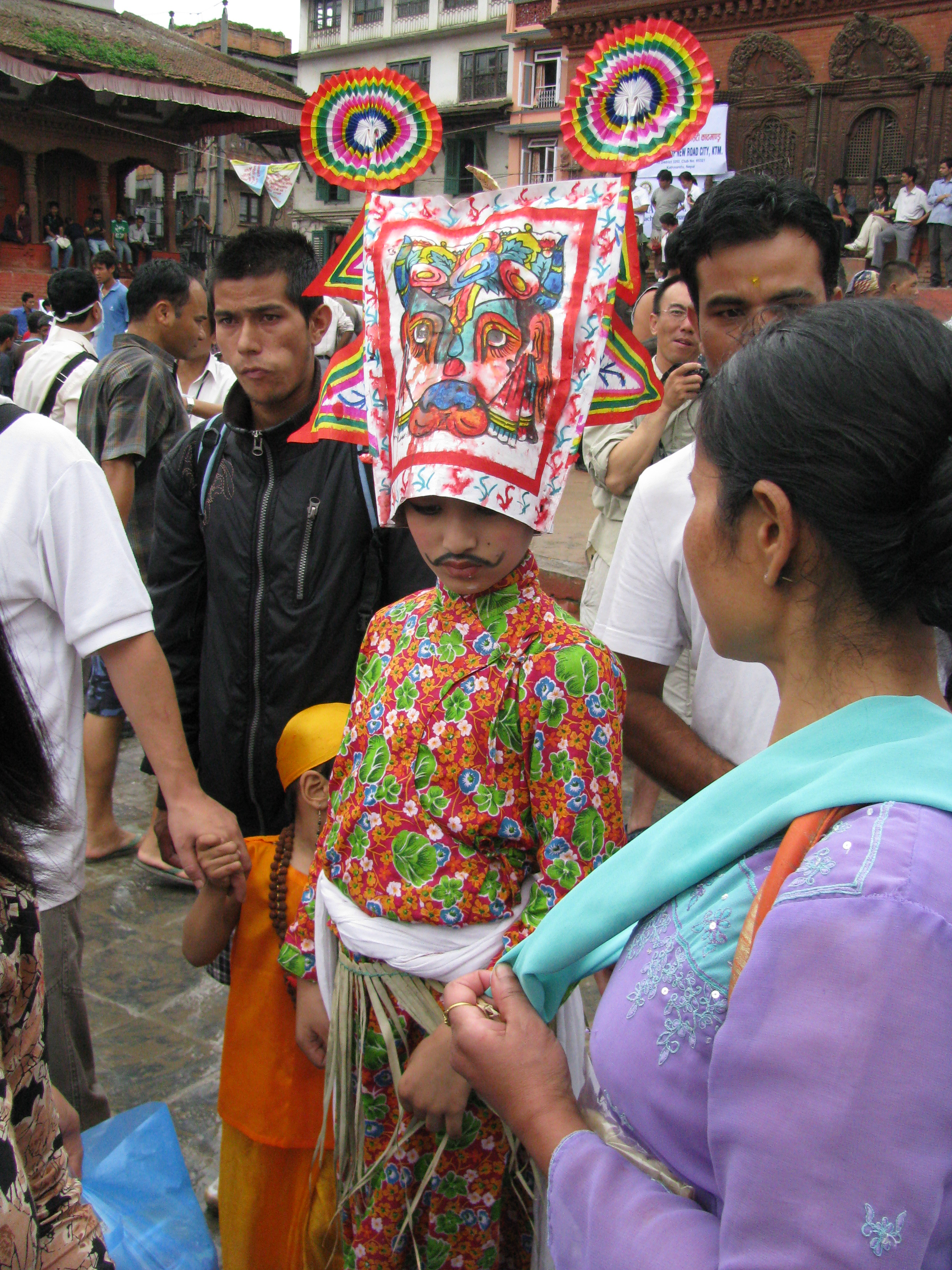 Gai Jatra Kathmandu Nepal